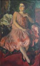 Фотографија слике Бранко Поповић Девојка у природи (1910.) пренето са сајта:Овде